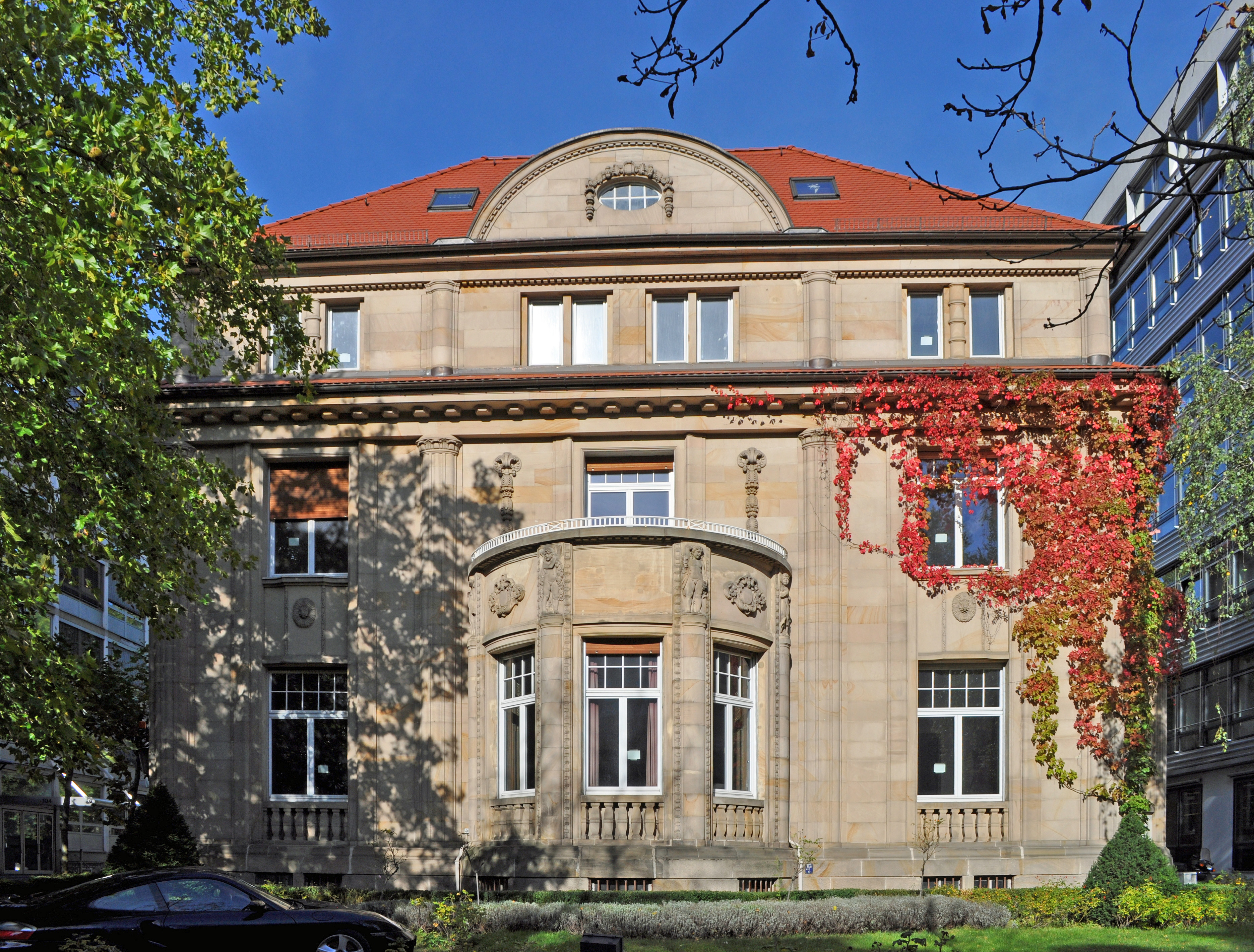 Denkmalgeschütztes Gebäude Bockenheimer Landstraße 102 in Frankfurt